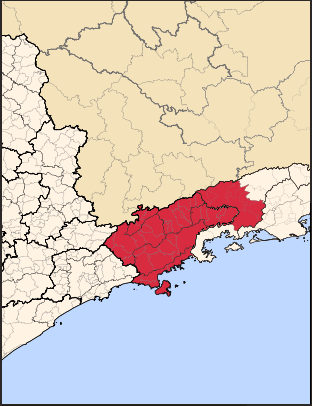 Map locator of Vale do Paraíba region